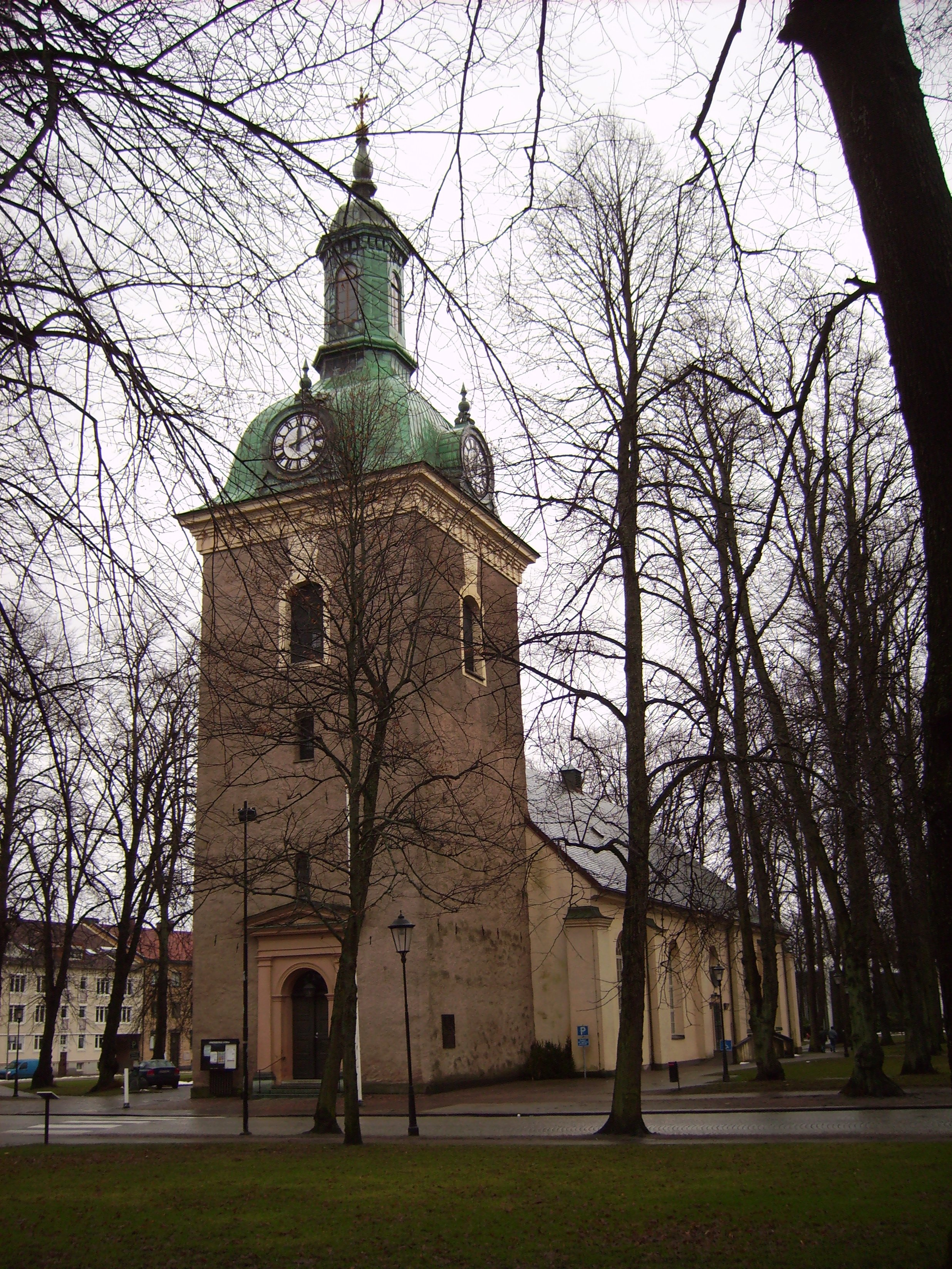 The head church in Vänersborg, Västergötland, Sweden.